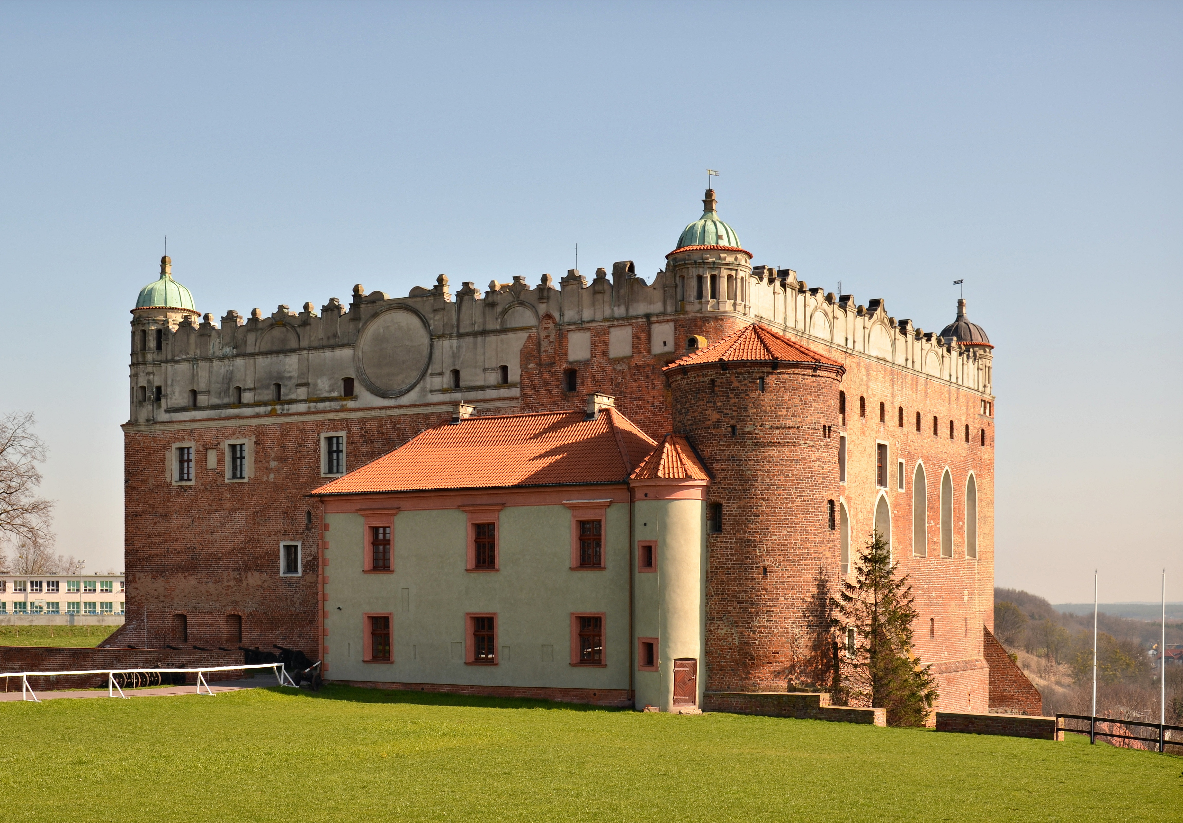 Golub-Dobrzyń, zamek, XIII/XIV, XVI, XVII w.